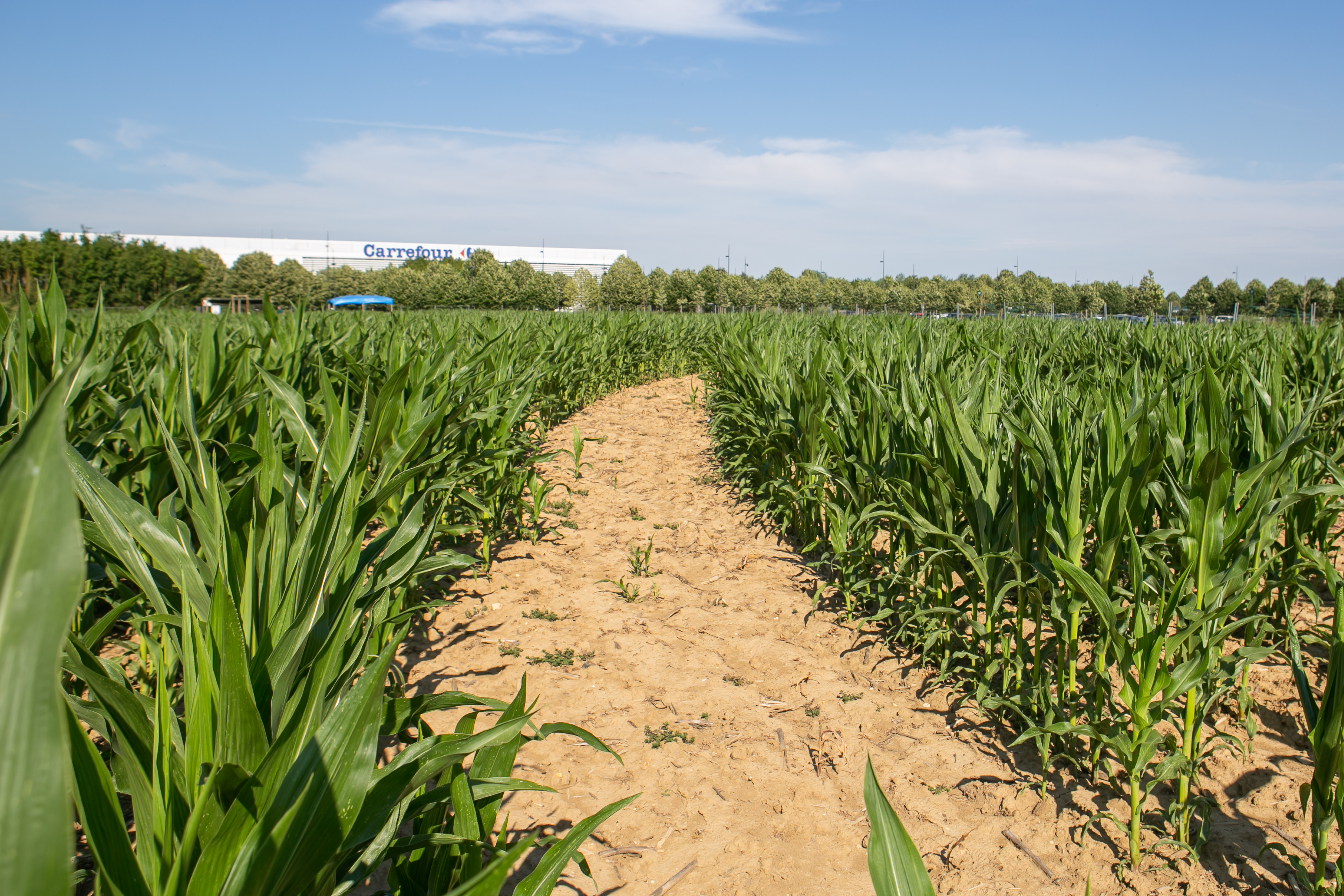 Vue du labyrinthe végétal (plants de maïs) de Carré Sénart / Lieusaint / Seine-et-Marne / France